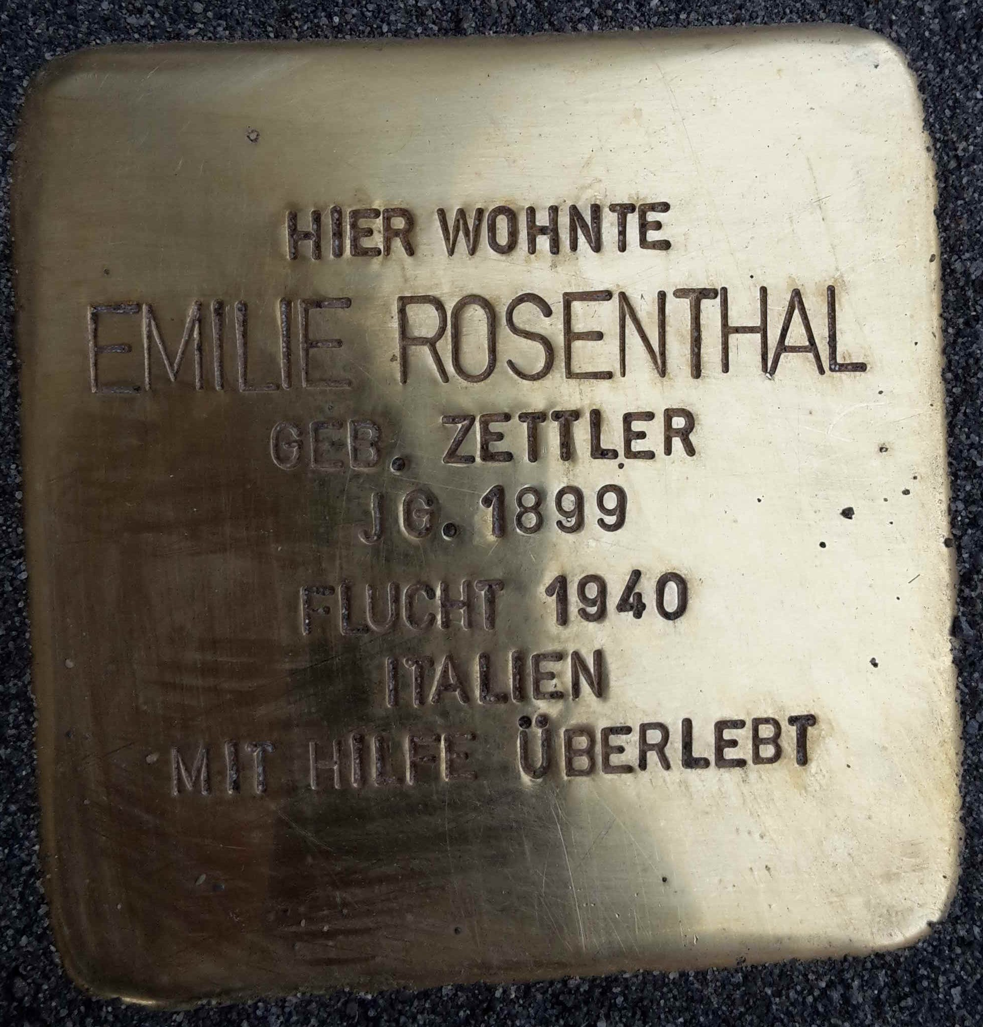 Stolperstein für Emilie Rosenthal in Neu-Ulm